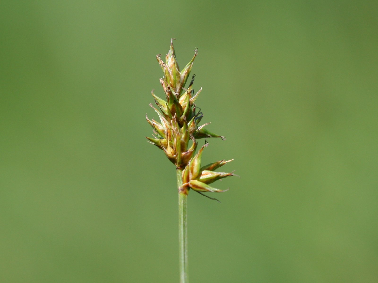 Paira-Segge (Carex pairaei)